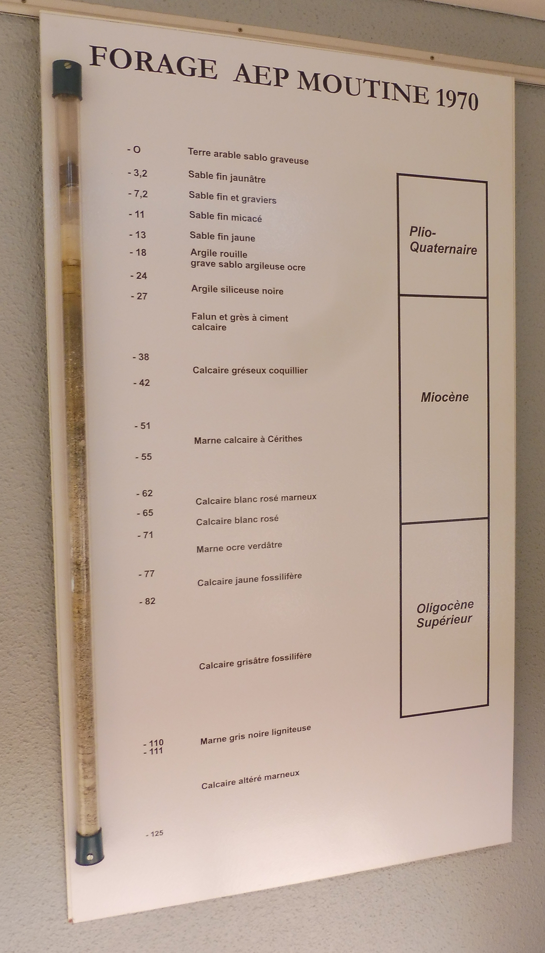 Forage de 125 mètres de profondeur à Cestas-33, en 1970.